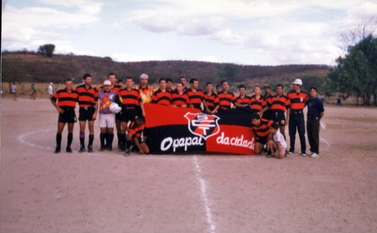 Equipe campeã tabirense de 1997.